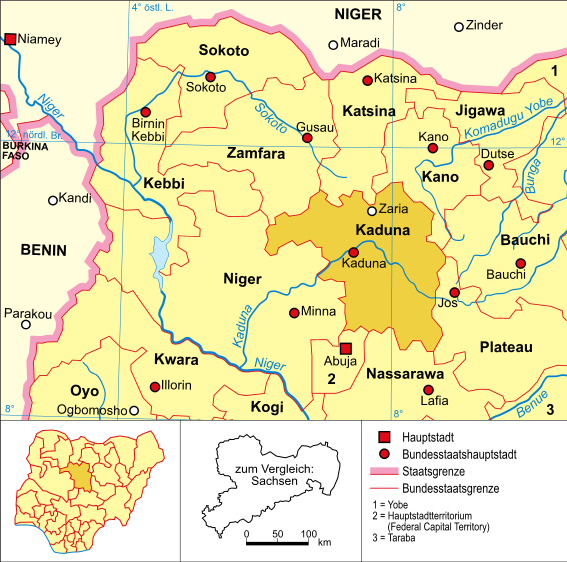 Politische Karte Nigerias (Bundesstaat Kaduna hervorgehoben)